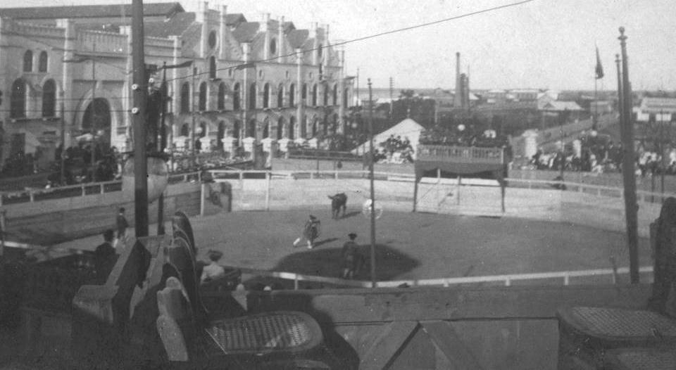 Vista de la Plaza de Toros que estaba en el Parque Lezama de Buenos Aires a fines del siglo XIX. Ubicada sobre el actual anfiteatro del lado de la calle Brasil. Atrás, asoman los depósitos de la Aduana, luego demolidos.